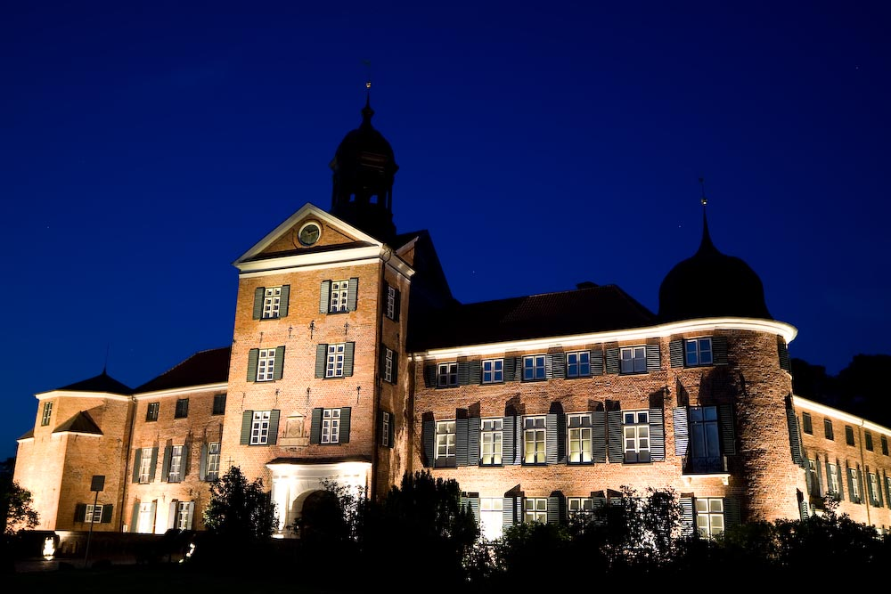 Eutiner Schloss nachts beleuchtet.